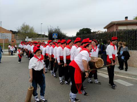 Festa de l'Arbre de Maig de Cornellà del Terri 2016. Transport de l'arbre que s'aixecarà a la Plaça de l'Ajuntament de Cornellà del Terri